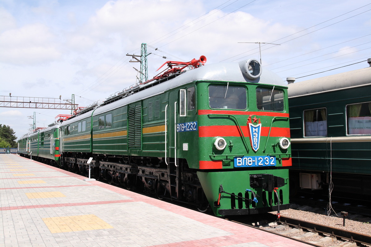 Построен НЭВЗ. В 1965 г. присвоен индекс ВЛ8-1232. С завода поступил в ТЧ Златоуст. В 1963 г. передан в ТЧ Дёма. В 1970 г. передан в ТЧ Тайга. В 1977 г. передан в ТЧ Тбилиси. В 1981 г. передан в ТЧ Тбилиси-Сортировочный. В 1981 г. передан в ТЧ Хашури. В 1983 г. передан в ТЧ Туапсе. В 1983 г. передан в ТЧ Кировобад. В 1983 г. передан в ТЧ Туапсе. В 1998 г. передан в Новосибирский ж.д. музей.